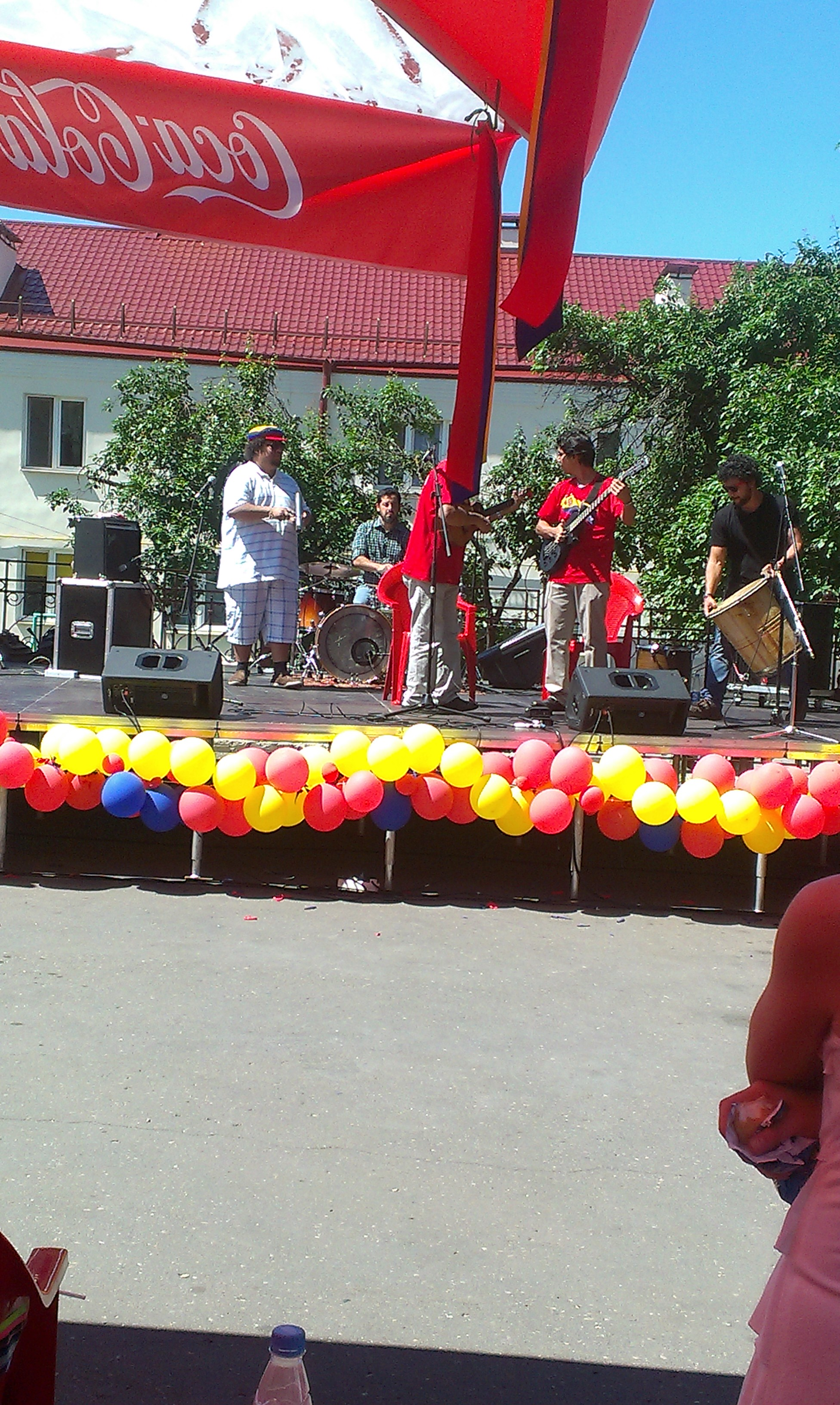 Венесуэльскі падворак на X Рэспубліканскім фестывале нацыянальных культур